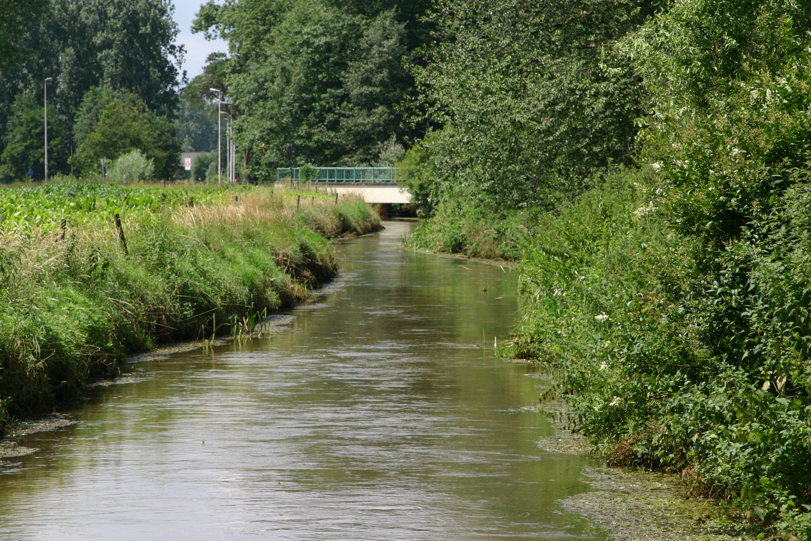 Mangelbeek zu Lummen.